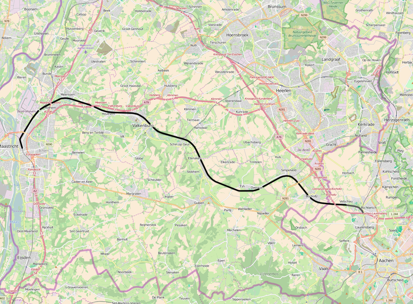 DB 2545, Aachen - Maastricht